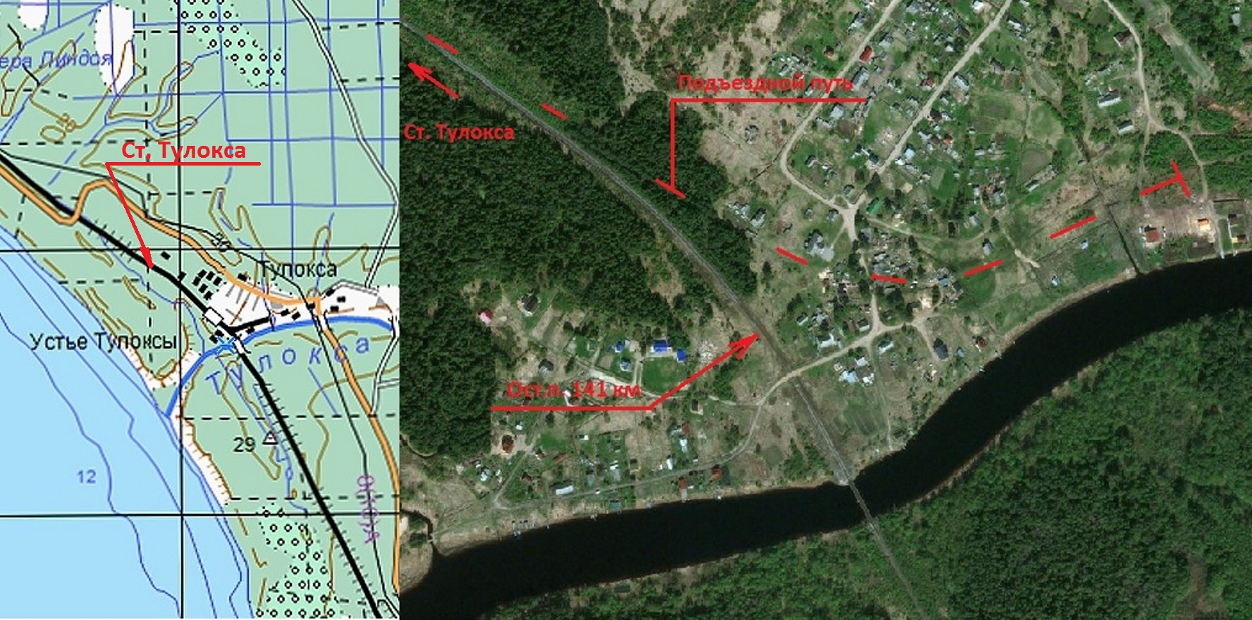 Схема подъездного пути ст. Тулокса.